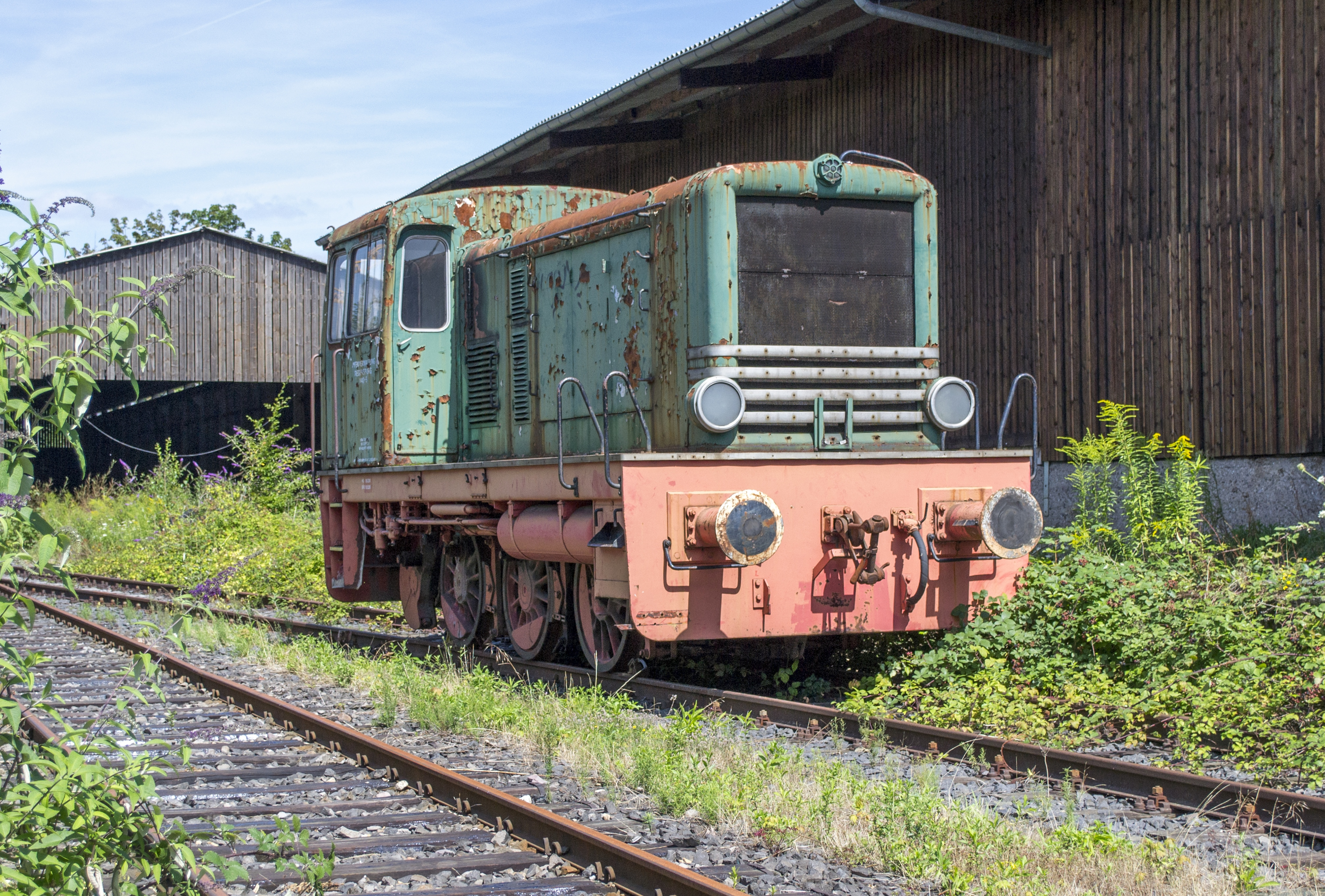 In Bonn Beuel staat op een achteraf spoortje deze Krauss-Maffei ML 400 C. Baujahr 1951. Een V40-5 rangeerdiesel van Hafenverwaltung Regensburg